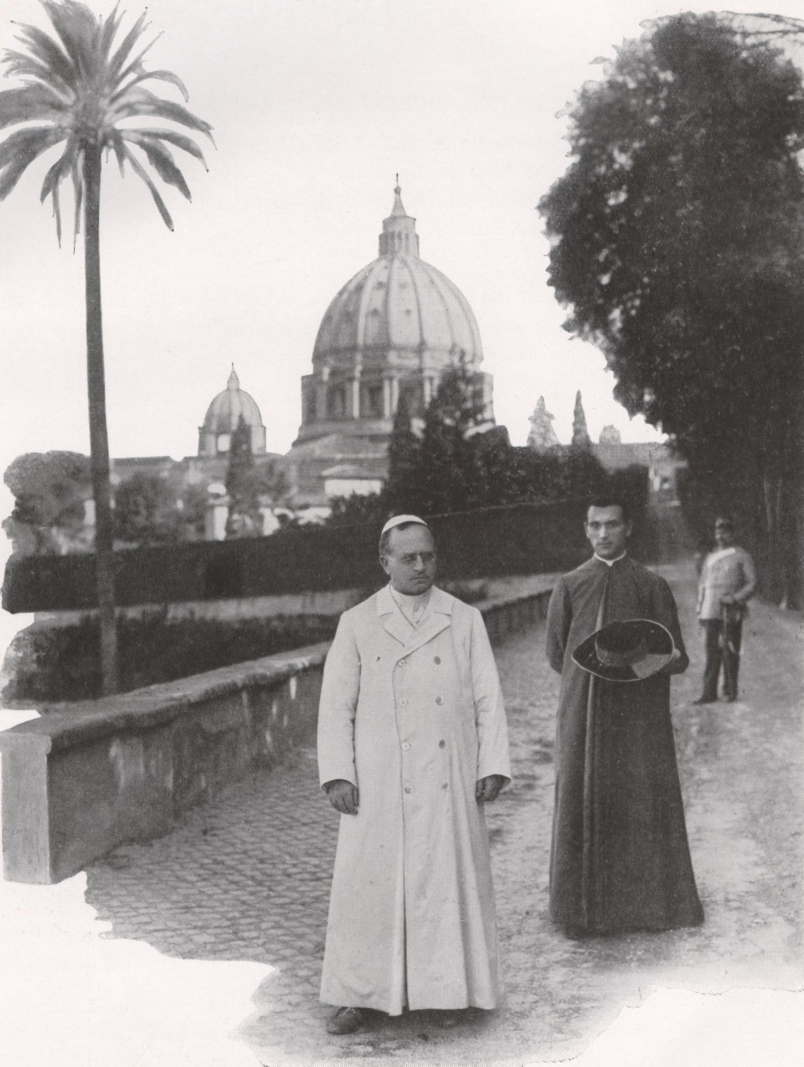 Pius XI. beim Spaziergang in den Vatikanischen Gärten